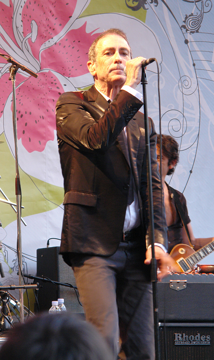 Alain Le Govic, nom de scène Alain Chamfort (Français, né en 1949 à Paris), chanteur et compositeur de musique de variété française.